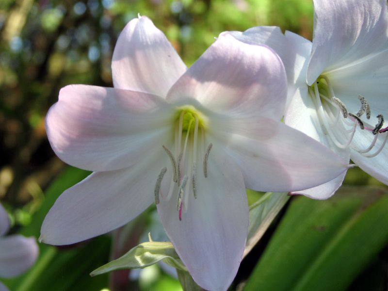 Crinum lily